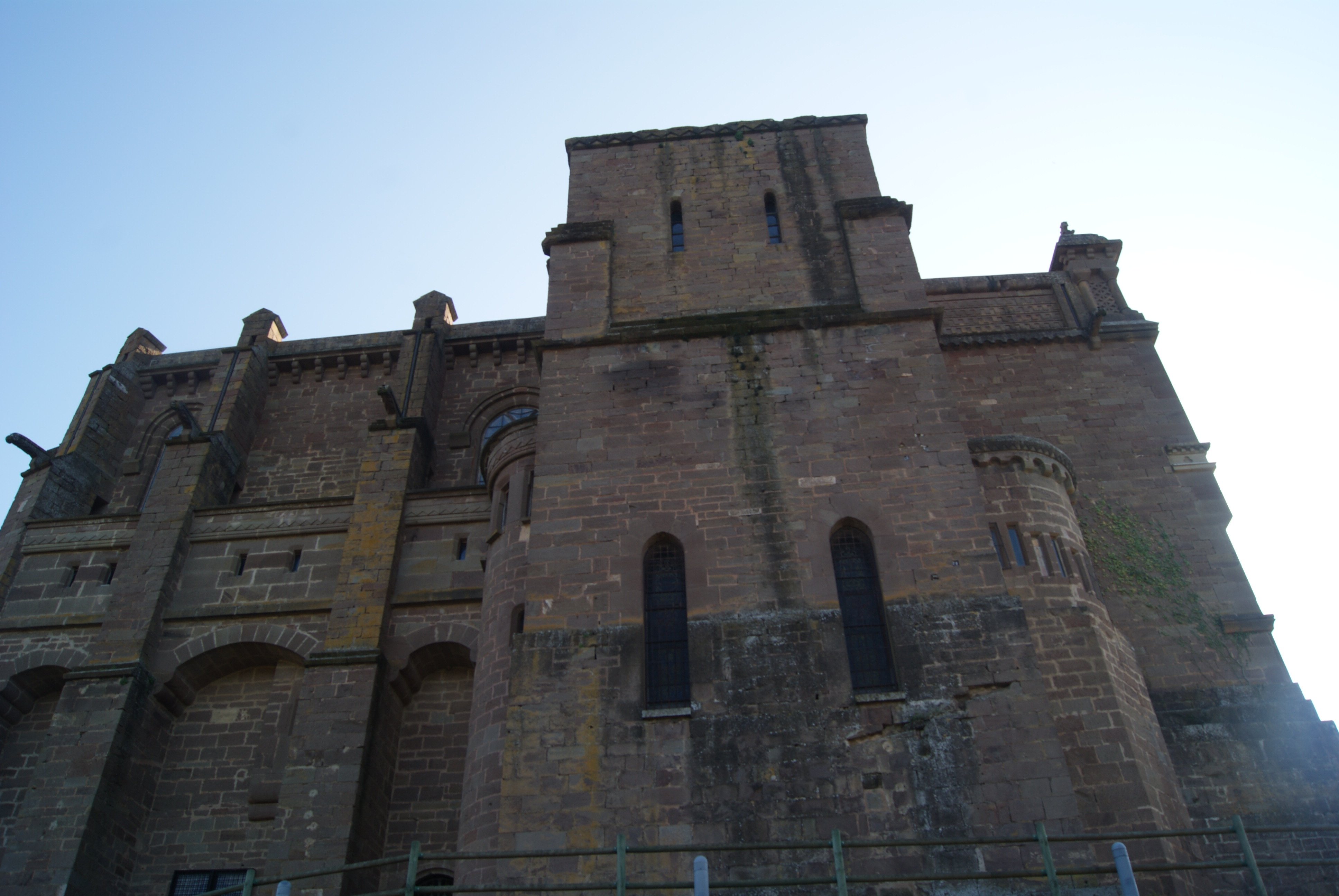 Basílica de Javier